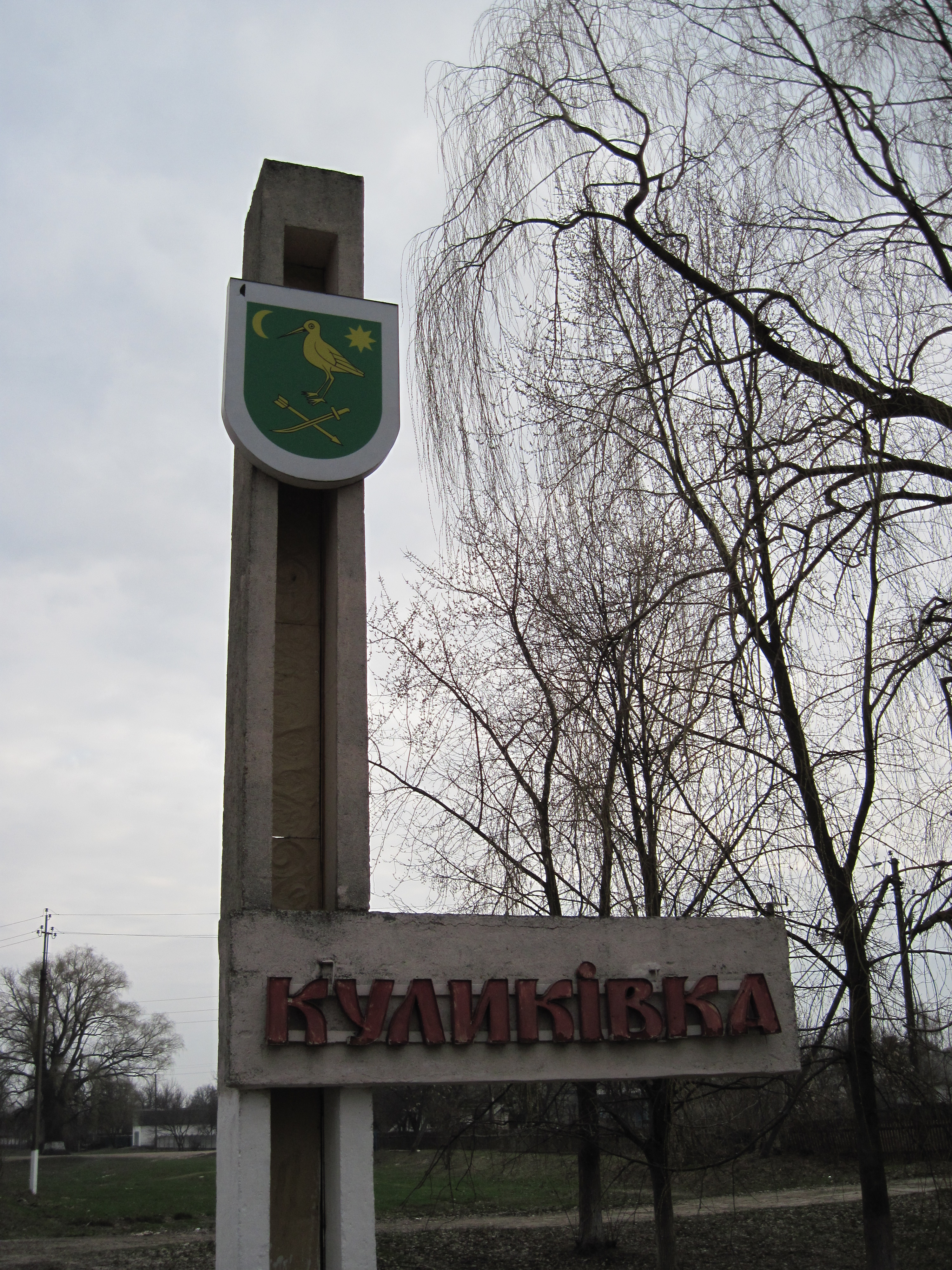 Въезд в Куликовку со стороны Чернигова